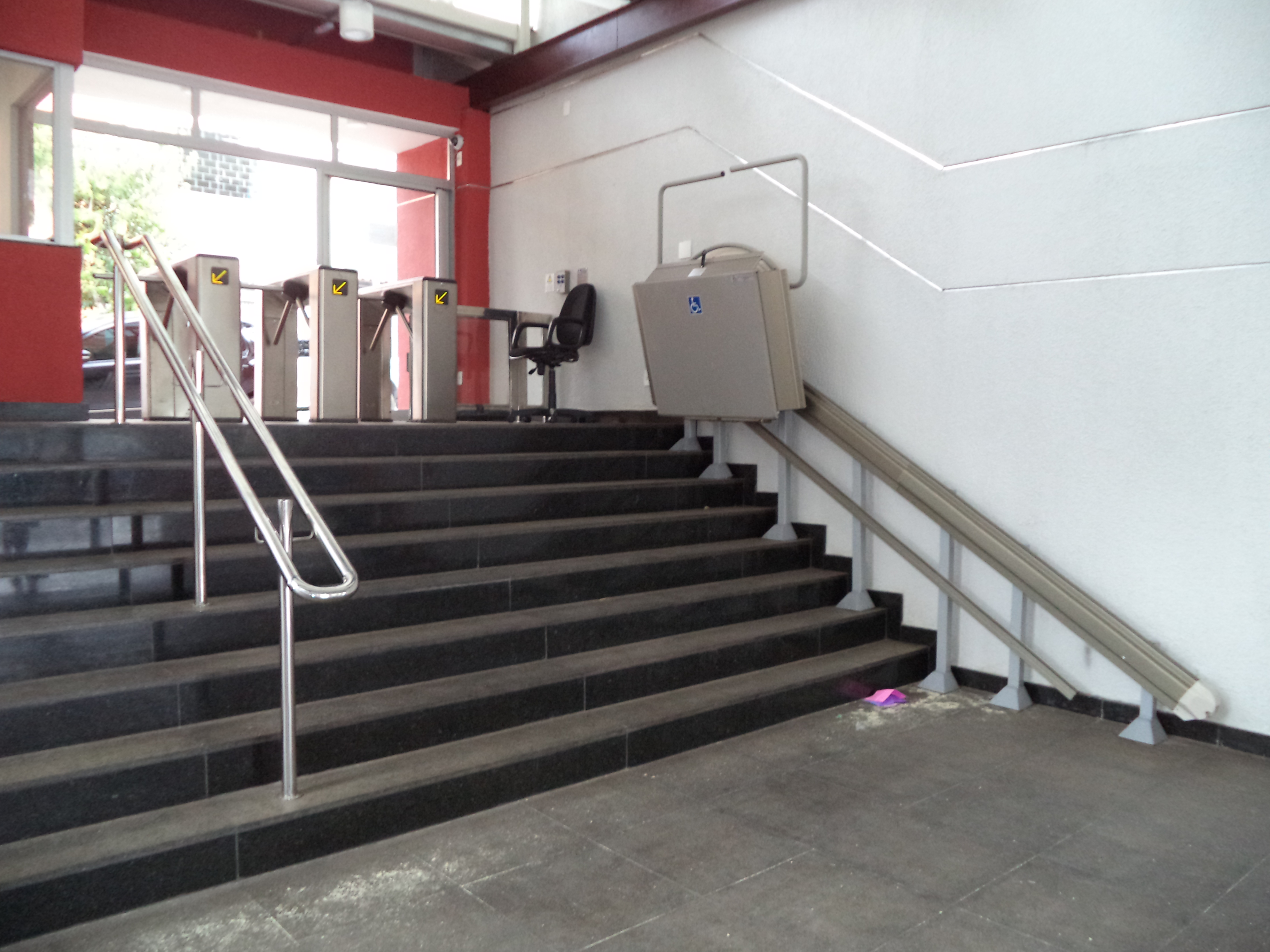 Elevador de acessibilidade em portaria do campus I do Cefet-MG.